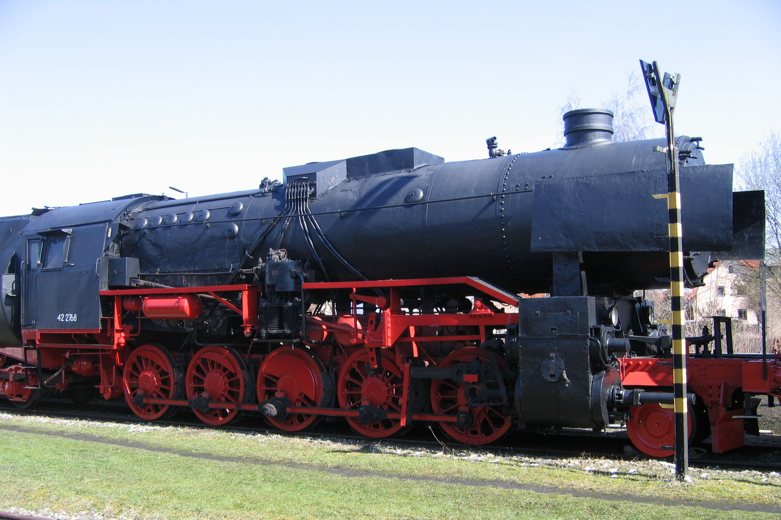 Dampflokomotive der Baureihe 42 im Bayerischen Eisenbahnmuseum Nördlingen.